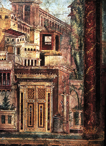 Wandmalerei in der Villa of P. Fannius Synistor, -Detail nach Bühnenmanier (Fantasiearchitektur), Boscoreale, Campania, Italien